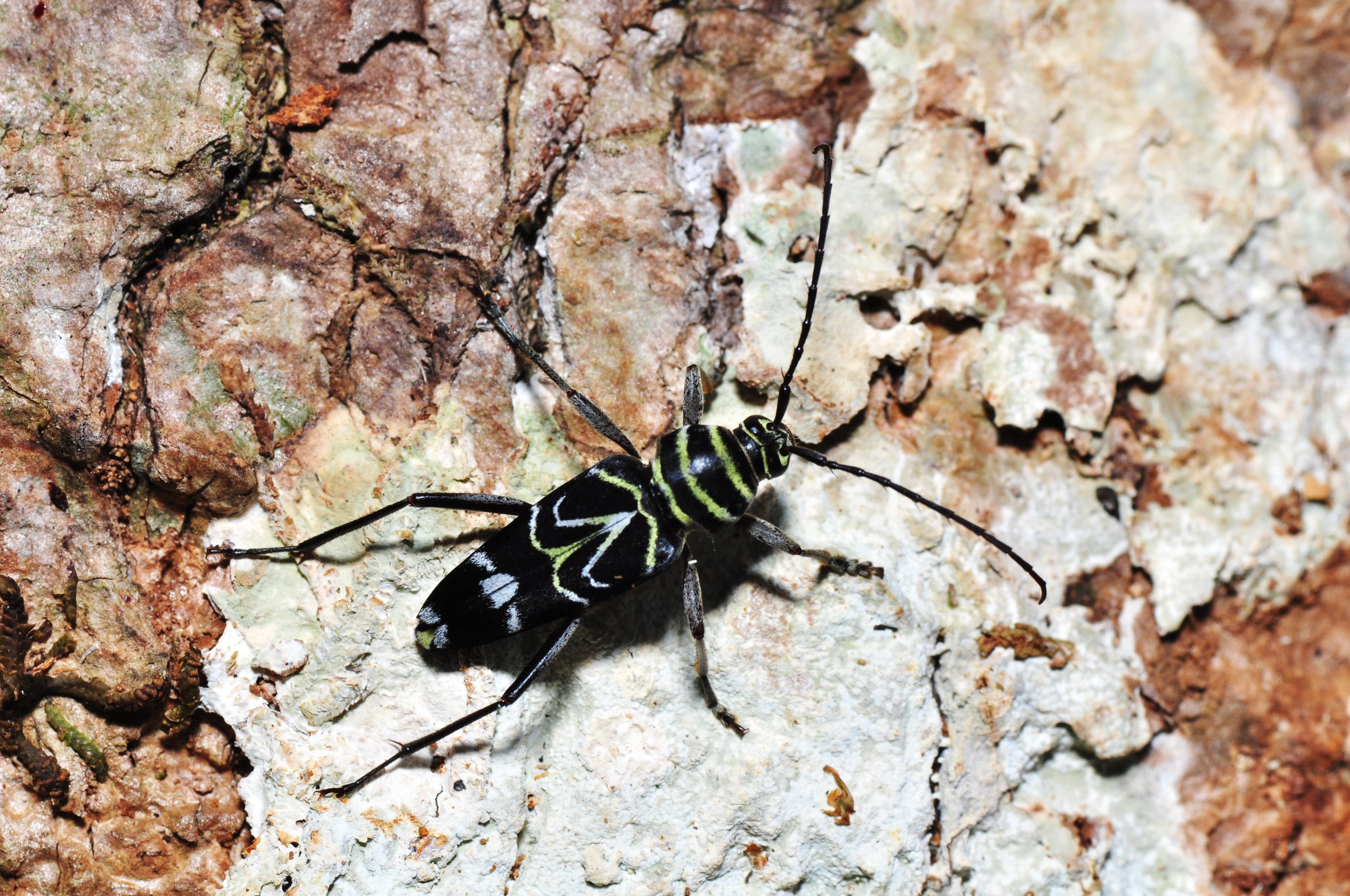 Megacyllene angulata (Fabricius) 1775